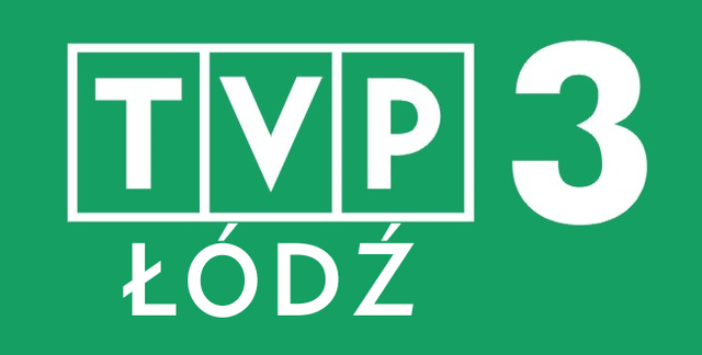 Druga wersja logo z lat 2003-2007